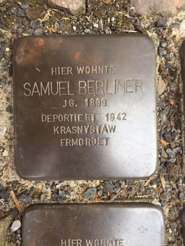 Stolpersteine